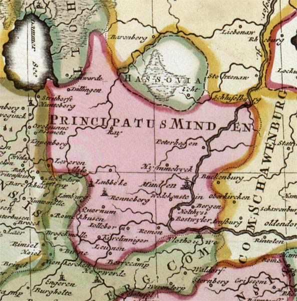 Fürstentum Minden, Ausschnitt aus: Karte des Reichskreises Westfalen - "Tabula Nova Atque Exacta Westphaliae Finitimas quoque Ditiones Prafecturas et Satrapias Eleganter Comprehendens, Conante Petro Schenck. Cum Priv. Ord. Gen. Noll. et Westfr."